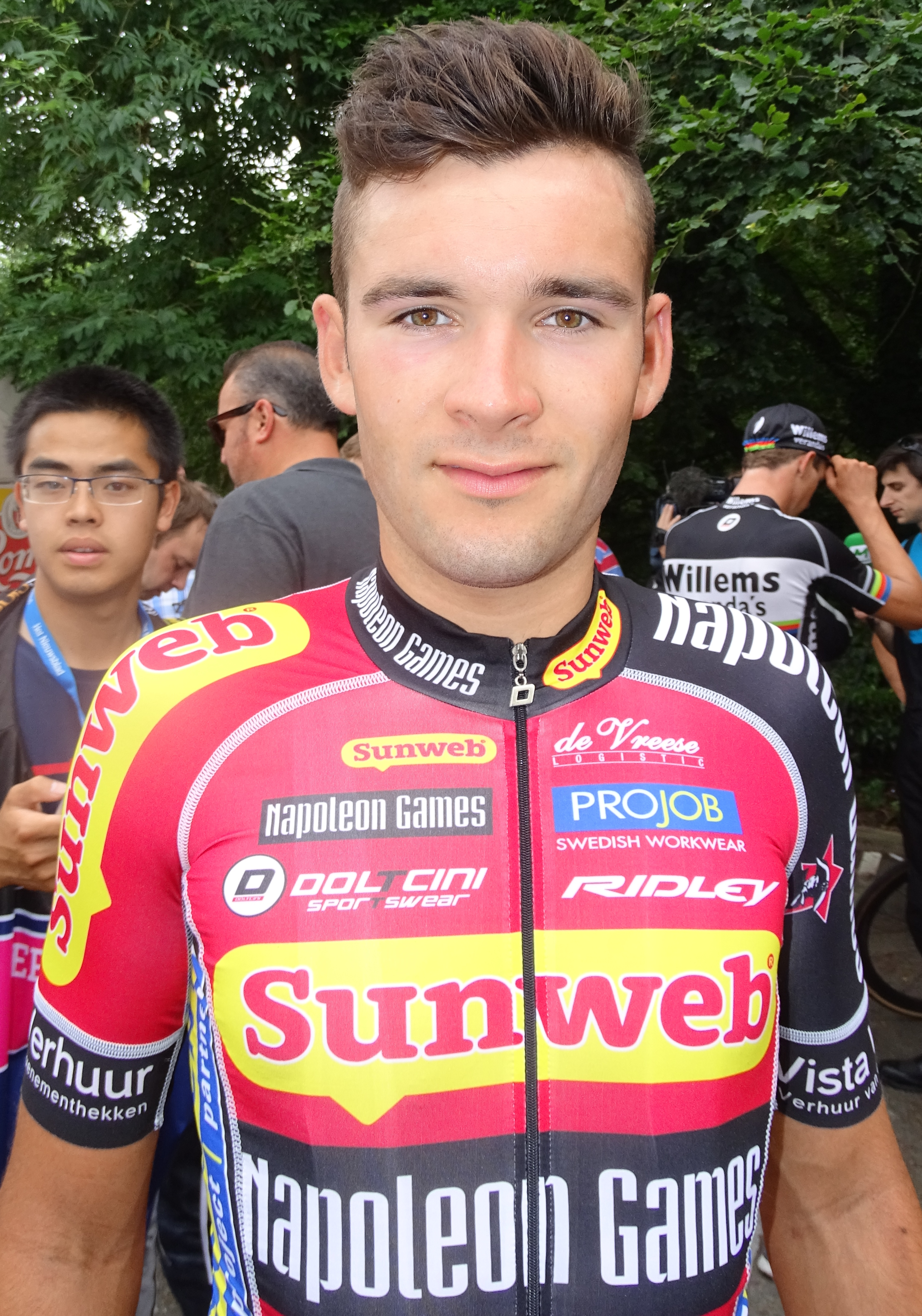 Reportage réalisé le samedi 4 juillet à l'occasion du départ et de l'arrivée du Circuit Het Nieuwsblad espoirs 2015 à Grotenberge (Zottegem), Belgique.